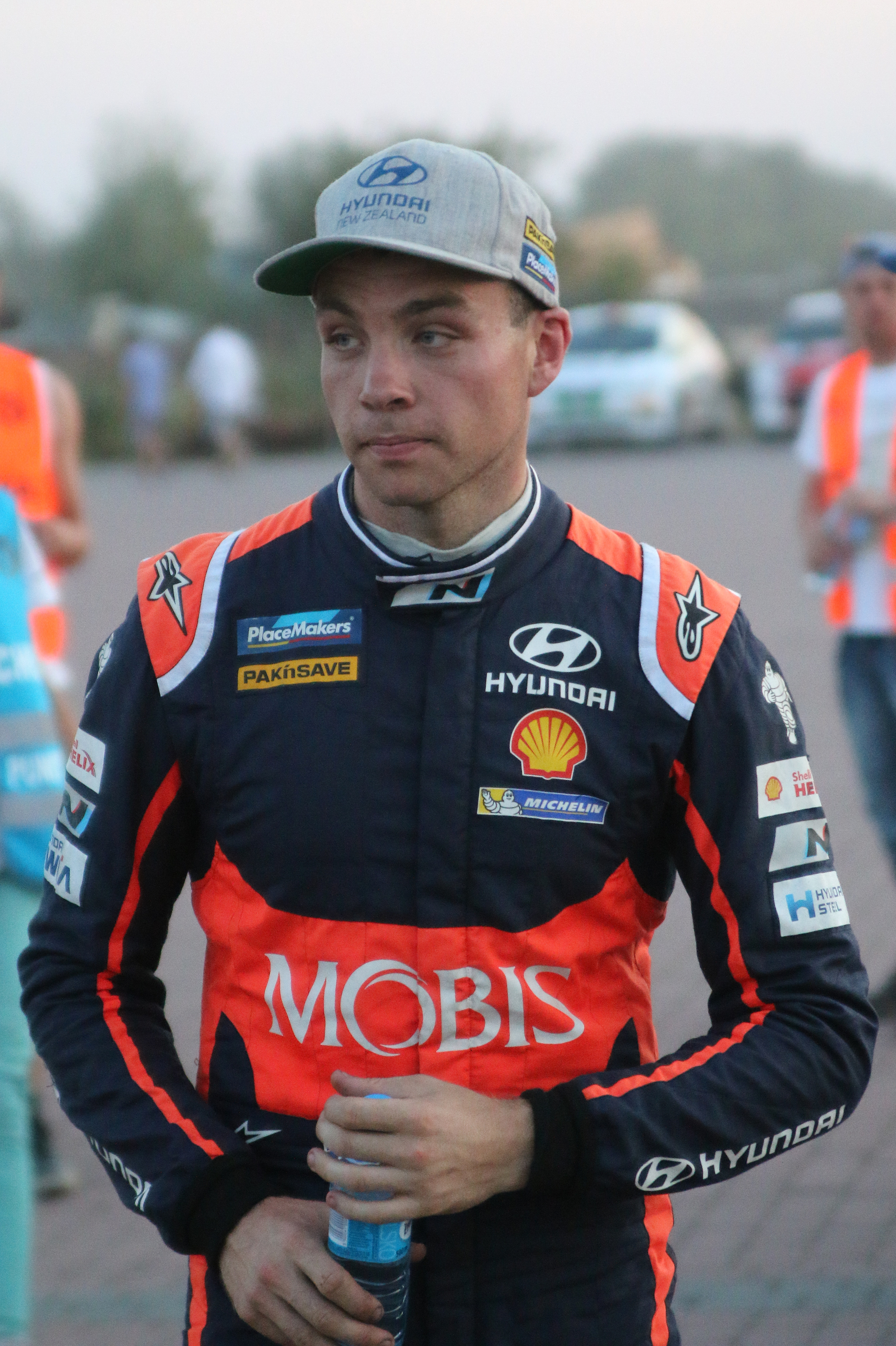 Hayden Paddon